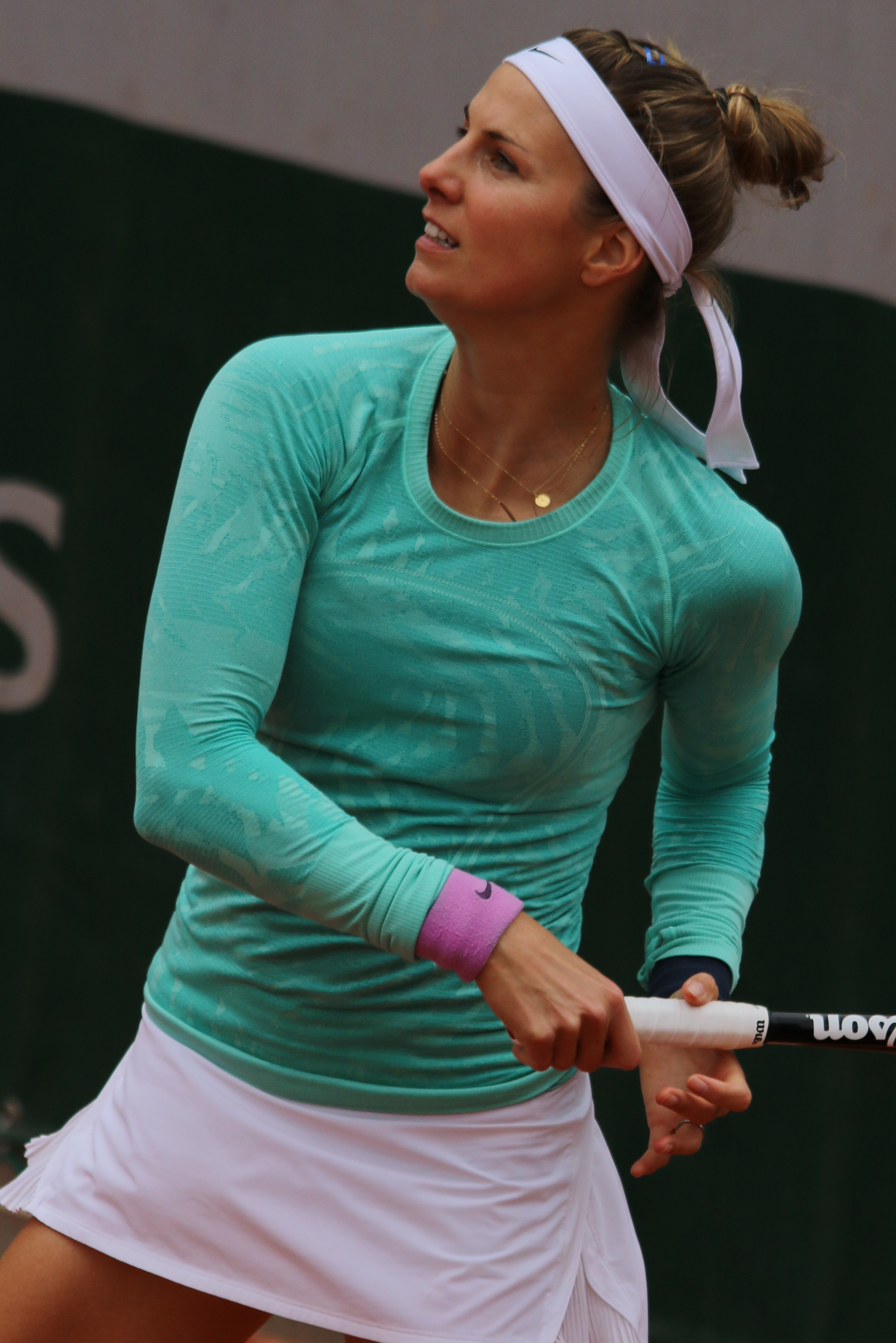 Minella RG19 (12)